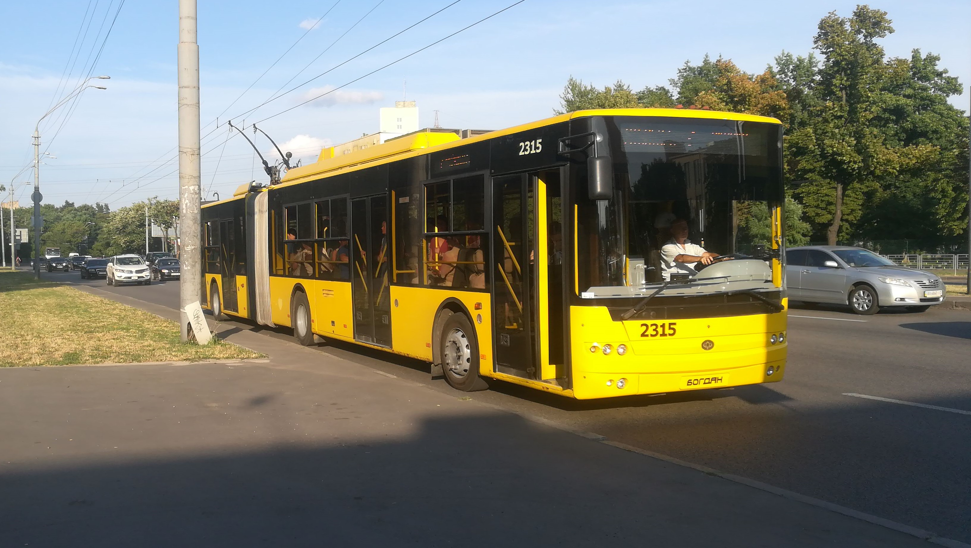 Тролейбус Богдан Т901.10 №2315 на проспекті Перемоги поблизу парку "Нивки" в Києві (маршрут 7)